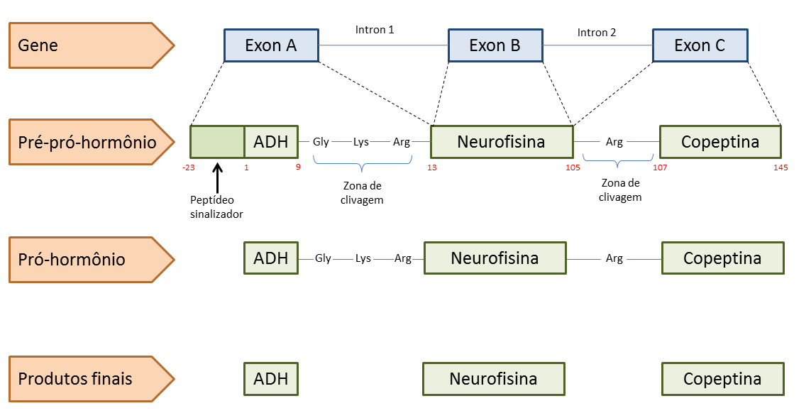 Gene codificador do ADH e seu produtos finais